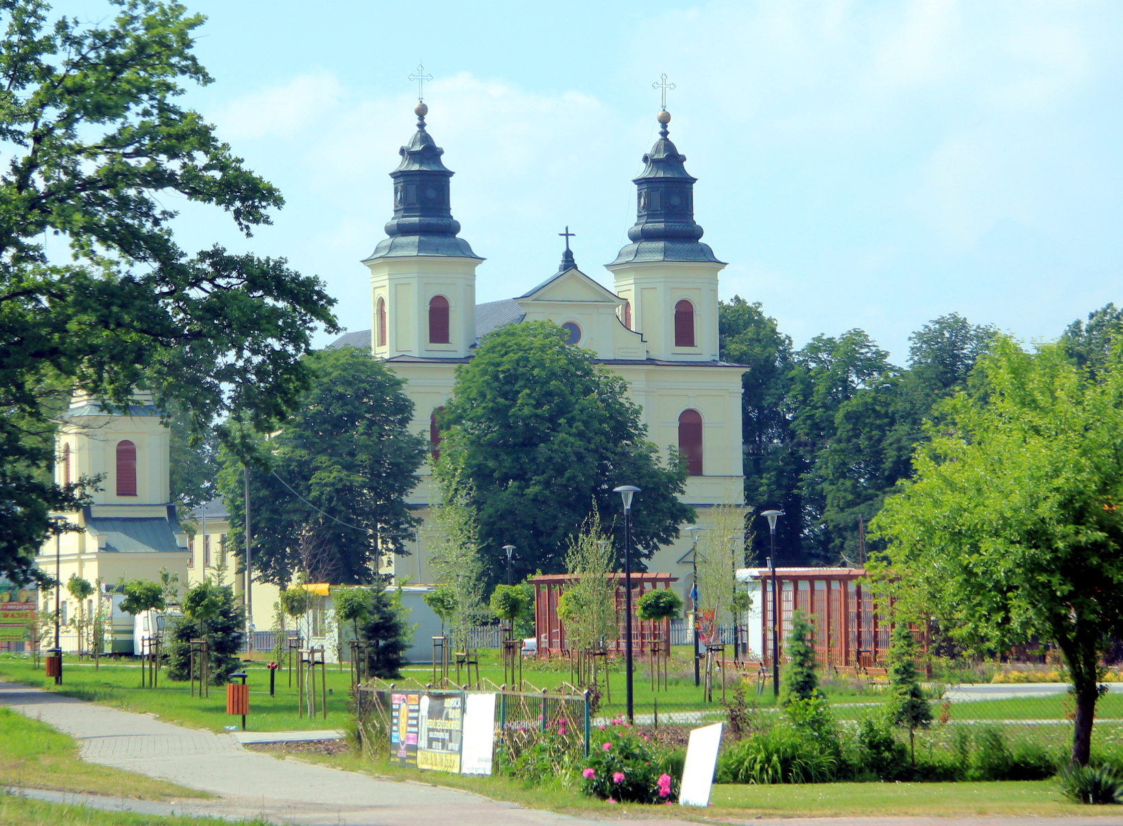 Zbuczyn - Kościół św. Stanisława, gmina Zbuczyn, woj. mazowieckie